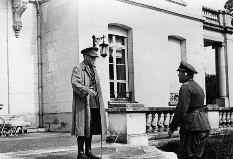 Heeresfilmstelle Negativ-Nr.: P.K. 86/13 Aufnahme am 28.05.40 Ort: Im Westen (Belgien) Kapitulation der belgischen Armee. Deutsche und belg. Parlamentäre treffen sich vor dem belgischen Quartier.